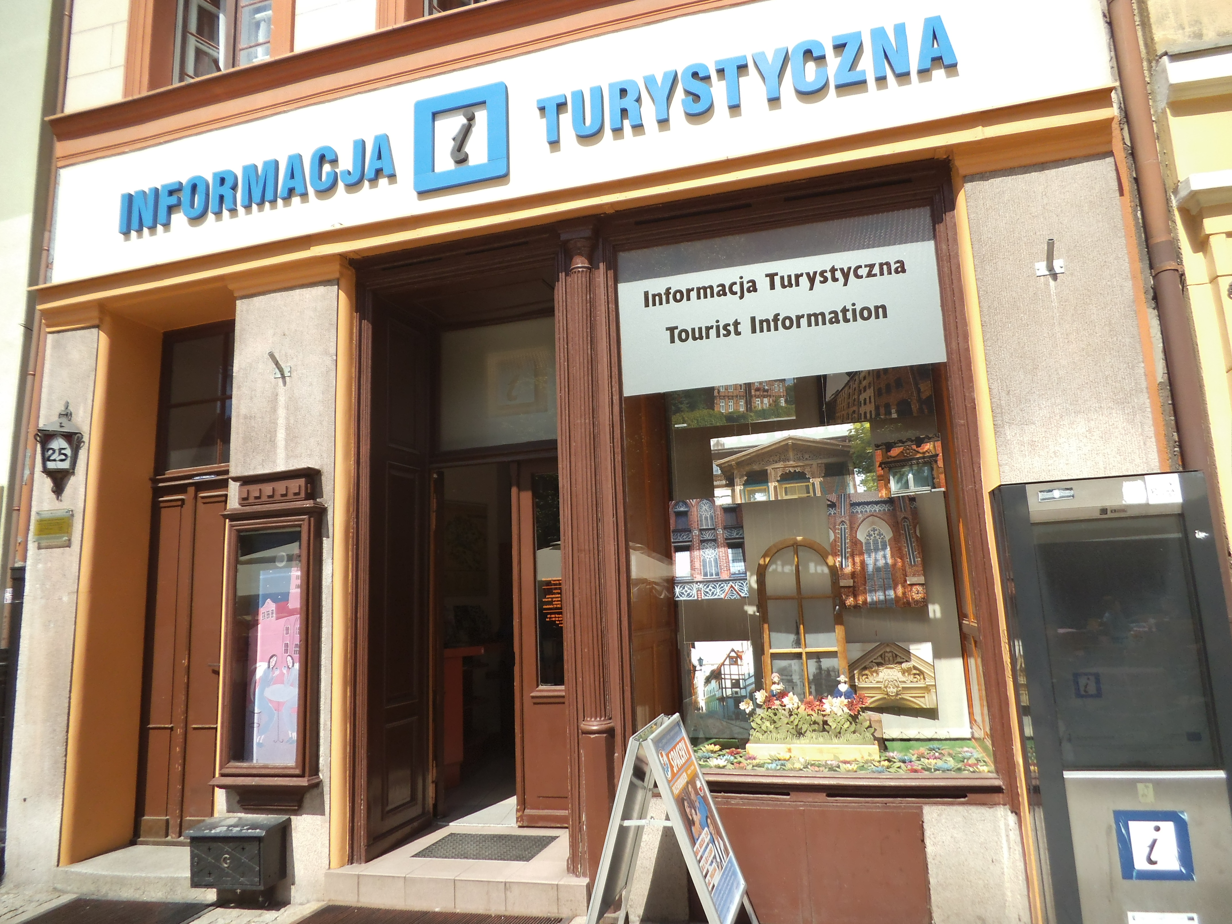 OIT Torun